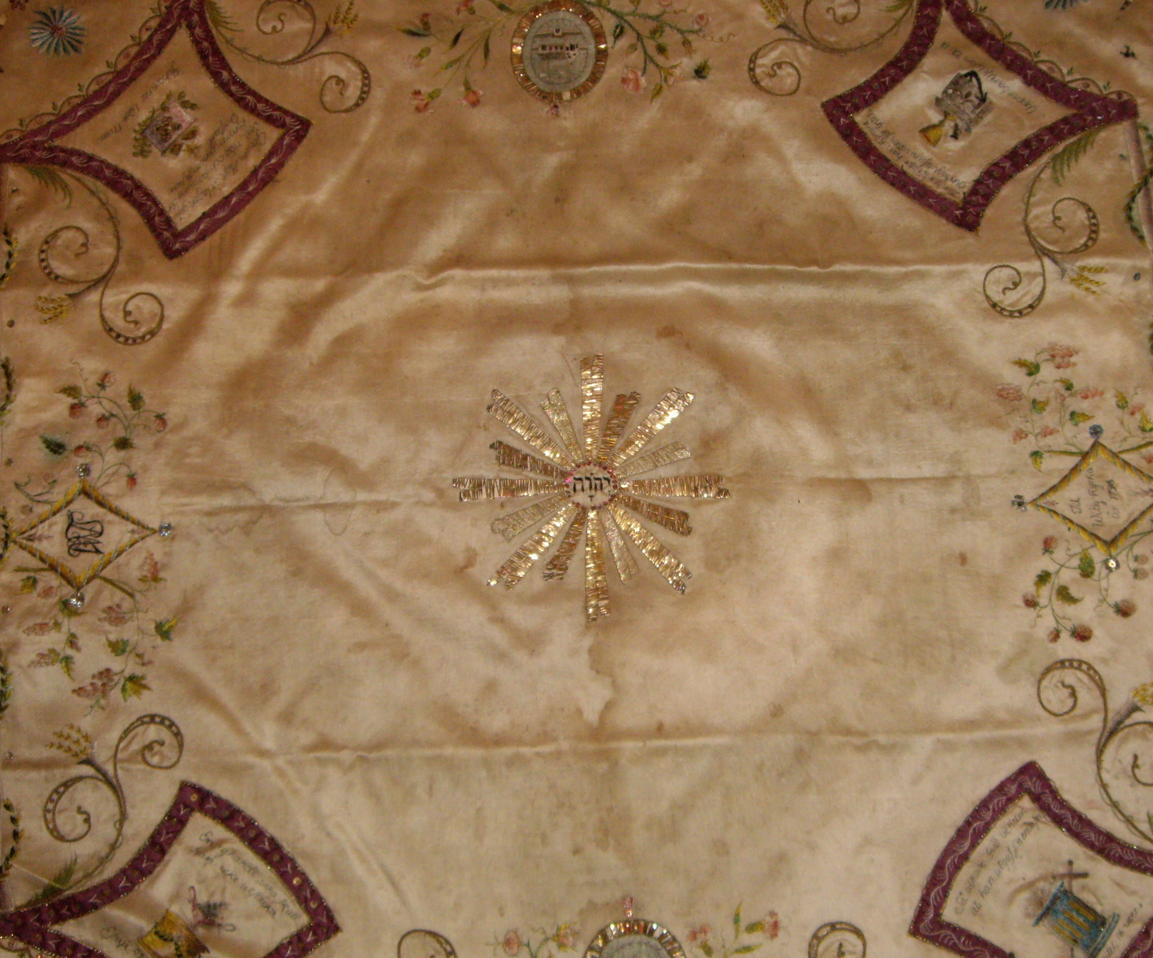 Kalkkläde i Viby kyrka från 1700-talet med tetragrammet JHWH i mitten